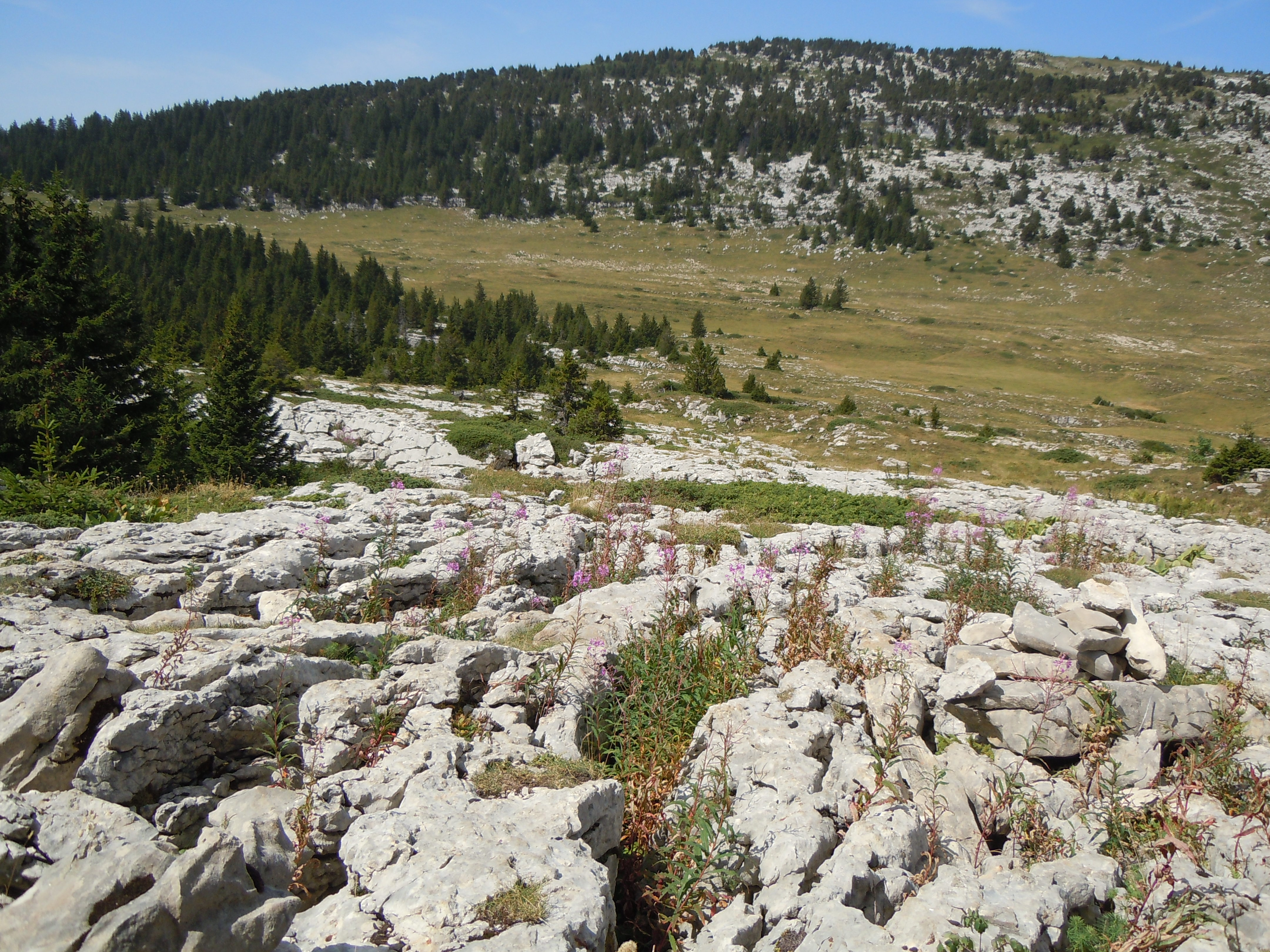 Habert de Saint-Vincent - Lapiaz face au Fouda Blanc - Réserve naturelle des Hauts de Chartreuse